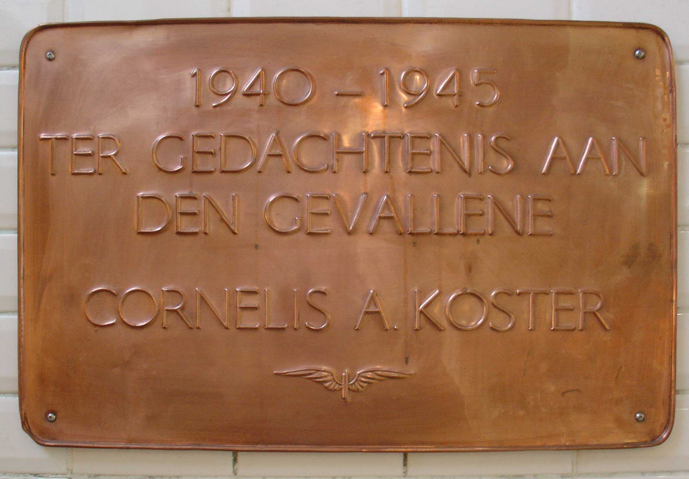 Plaquette Tweede Wereldoorlog NS door ir H.G.J. Schelling en dhr. H.J. Winkelman in het station van Gouda. De plaquette werd onthuld op 27 juli 1948 op de buitenmuur van het dienstgebouw van de NS te Moordrecht (voormalig stationsgebouw?), en is later overgebracht naar Gouda.